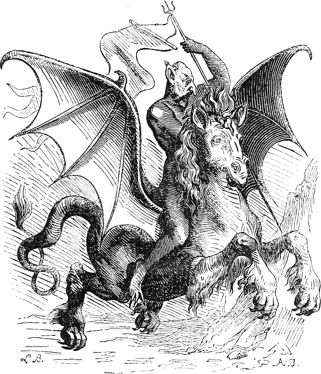 Une illustration pour l’article Abigor dans le Dictionnaire infernal par Collin de Plancy.